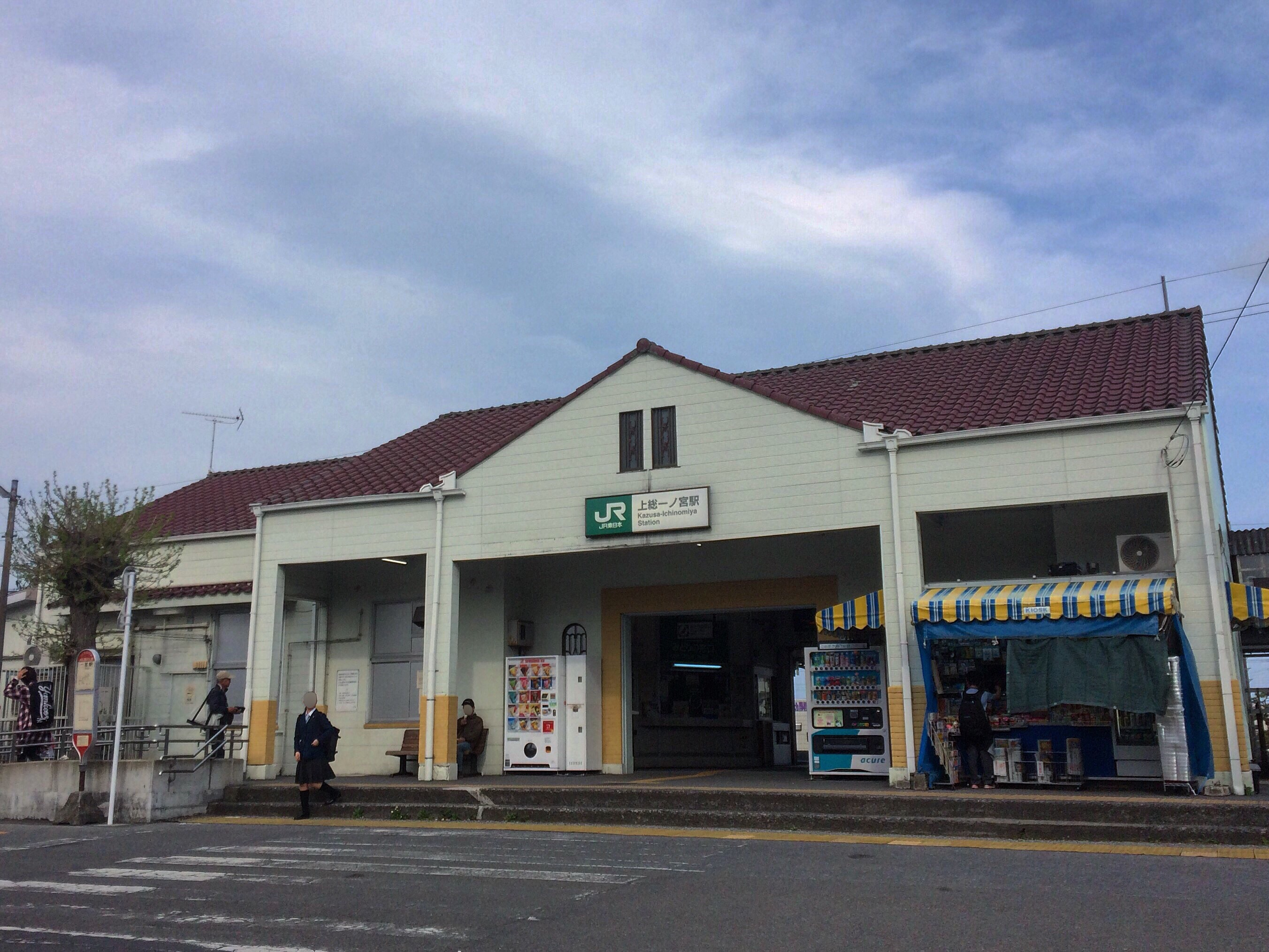 上総一ノ宮駅舎